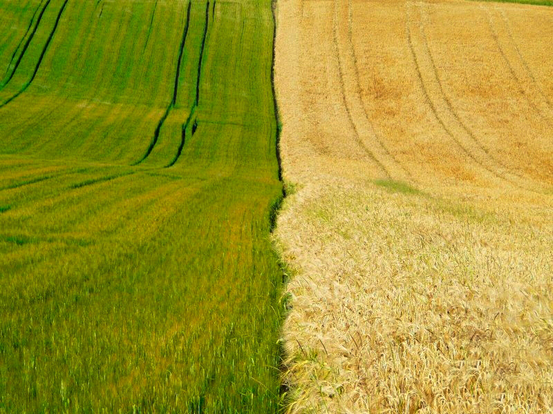 Zwei direkt aneinander grenzende Getreidefelder mit sichtbaren Fahrgassen